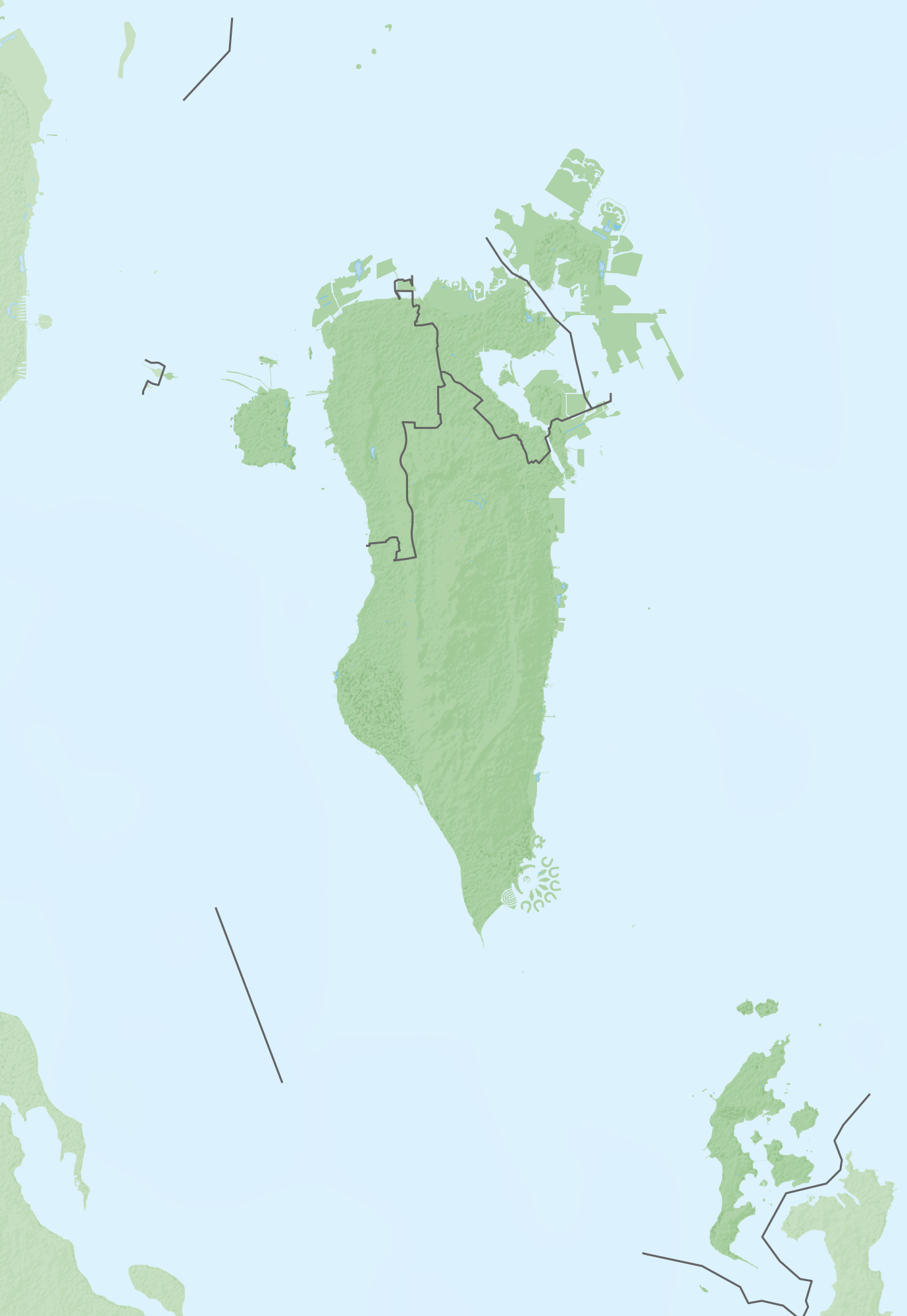 Reliefkarte Bahrain Topographischer Hintergrund: NASA Shuttle Radar Topography Mission (public domain). SRTM3 v.2. Grenzen: Bahrain location map.svg